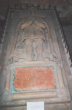 gisant ornant le cénotaphe de Guillaume VIII de Poitiers (nommé Guillaume VII par erreur), exposé dans l'église Saint-Jean de Montierneuf, à Poitiers. Ce gisant fut en partie détruit à la Révolution, puis restauré par l'abbé Sabourin, qui obtint pour cela des fonds de Louis XVIII. Le duc est représenté un lion à ses pieds.